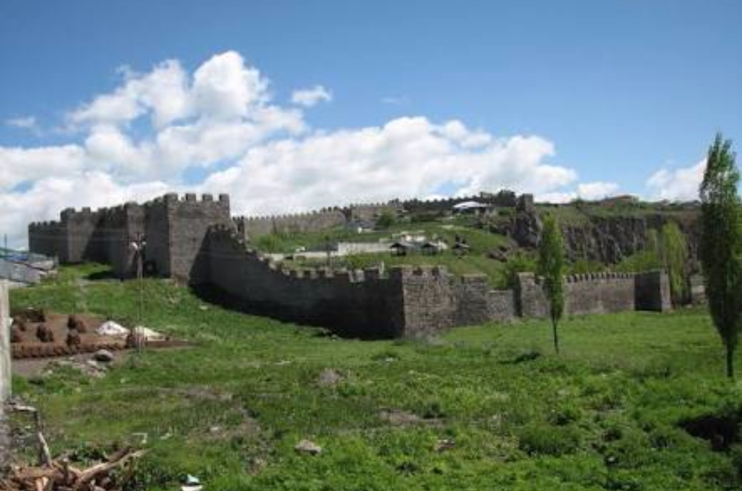 Ardahan